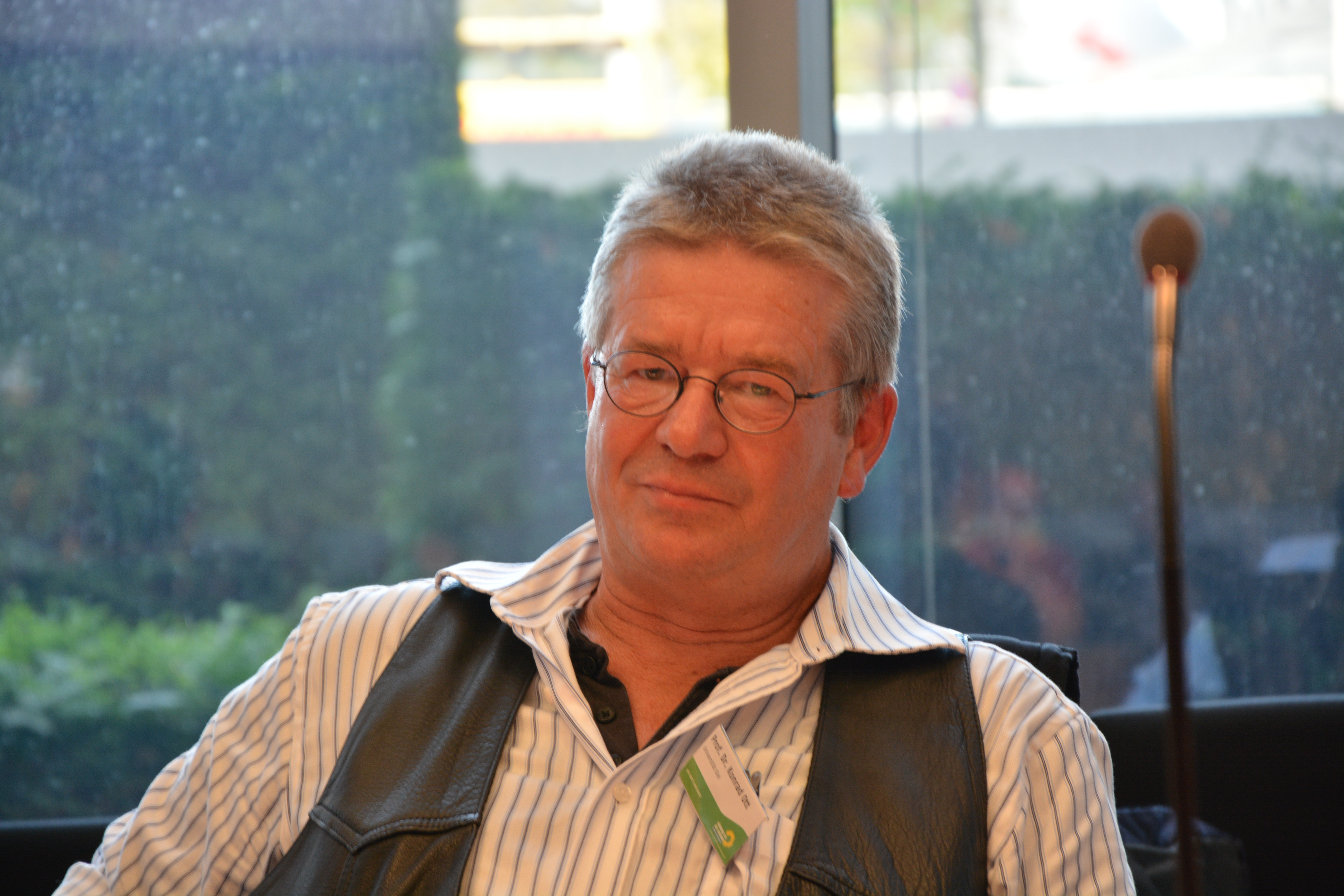 Forum 7: Politik und individuelle Lebensformen